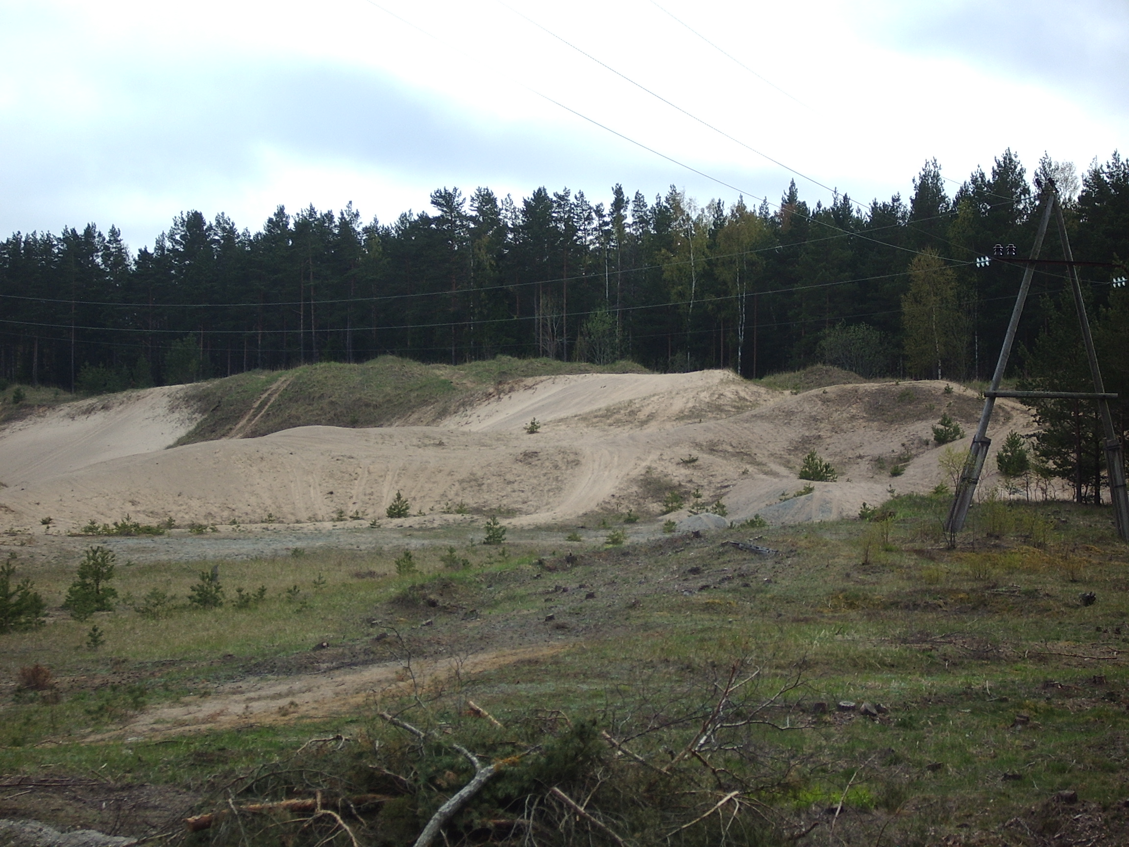 Endine liivakaevandus Viieristi looduskaitsealal, Sõrve poolsaarel